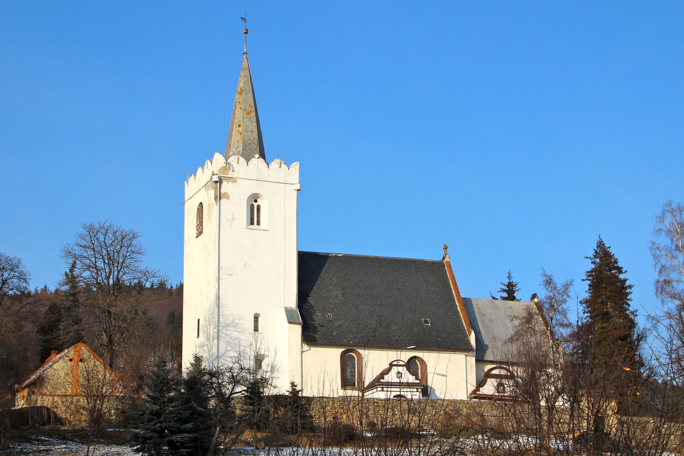 Kiełczyn – wieś w Polsce, na Śląsku, położona w województwie dolnośląskim, w powiecie dzierżoniowskim, w gminie Dzierżoniów.